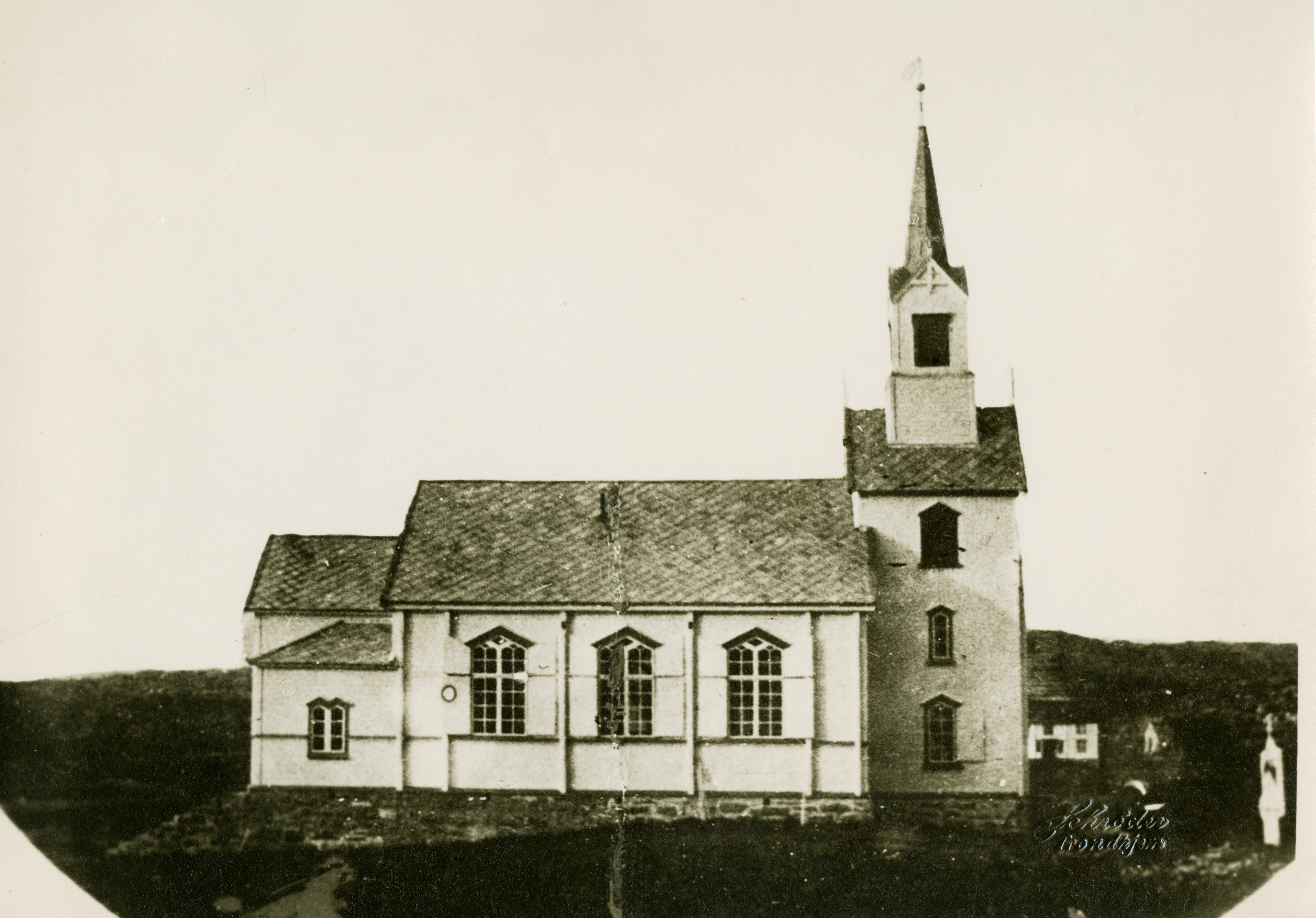 Stonglandseidet i Tranøy, Troms